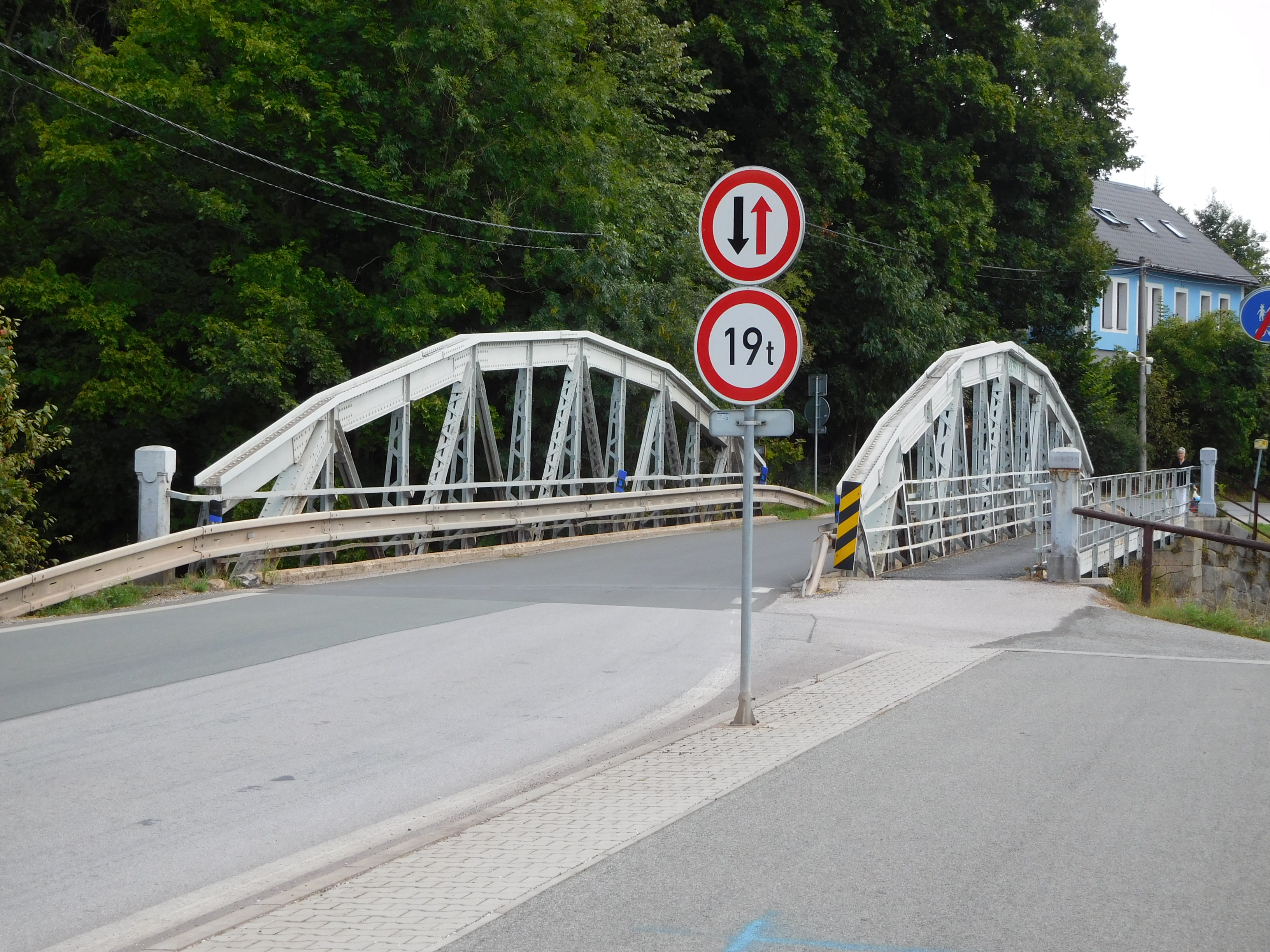 Hostinné - Vrchlabská, most přes Labe